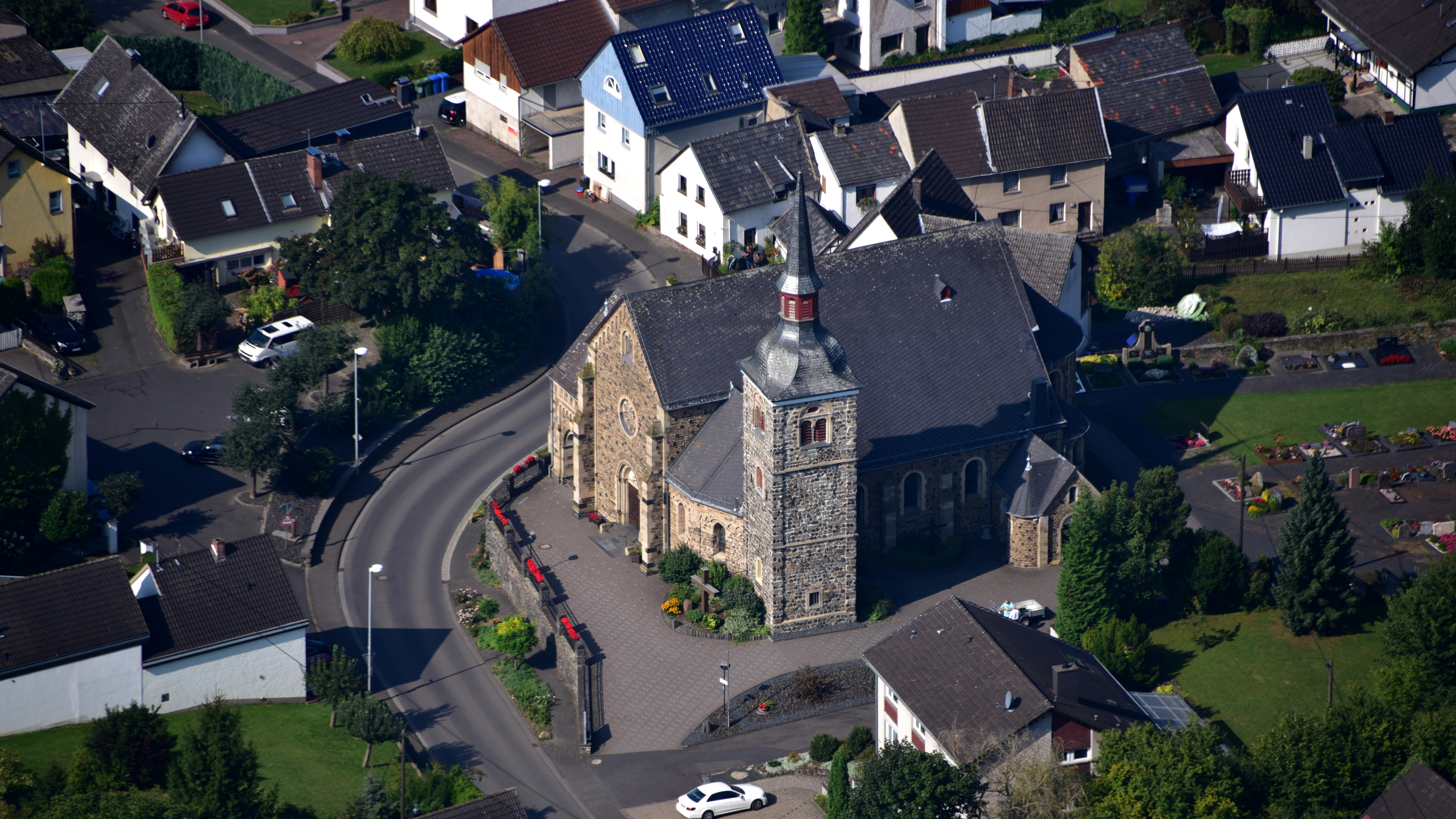 Kasbach-Ohlenberg, Ortsteil Ohlenberg, Pfarrkirche St. Nikolaus, Luftaufnahme (2017)